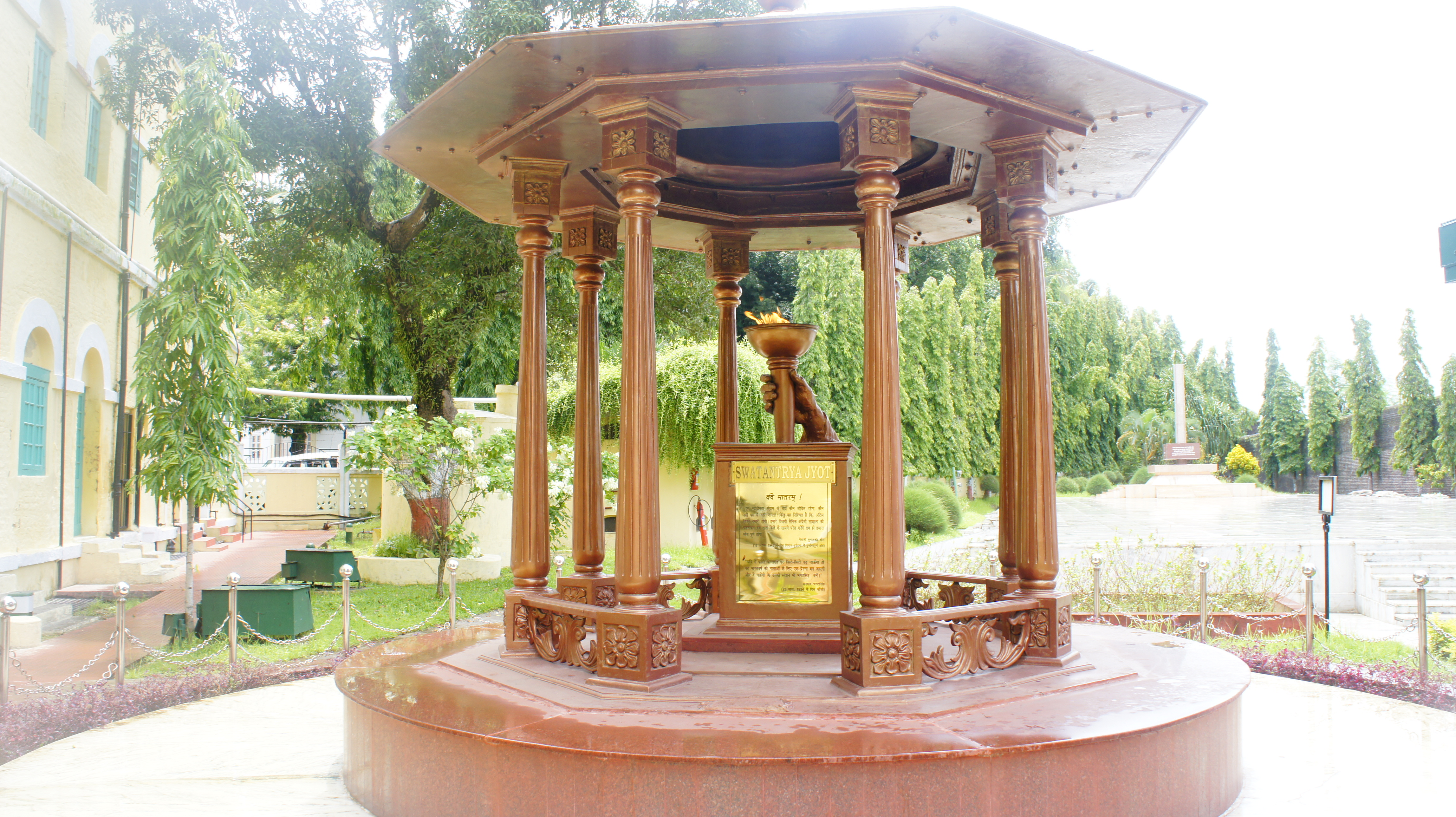 Вечный огонь в Сотовой тюрьме Cellular Jail